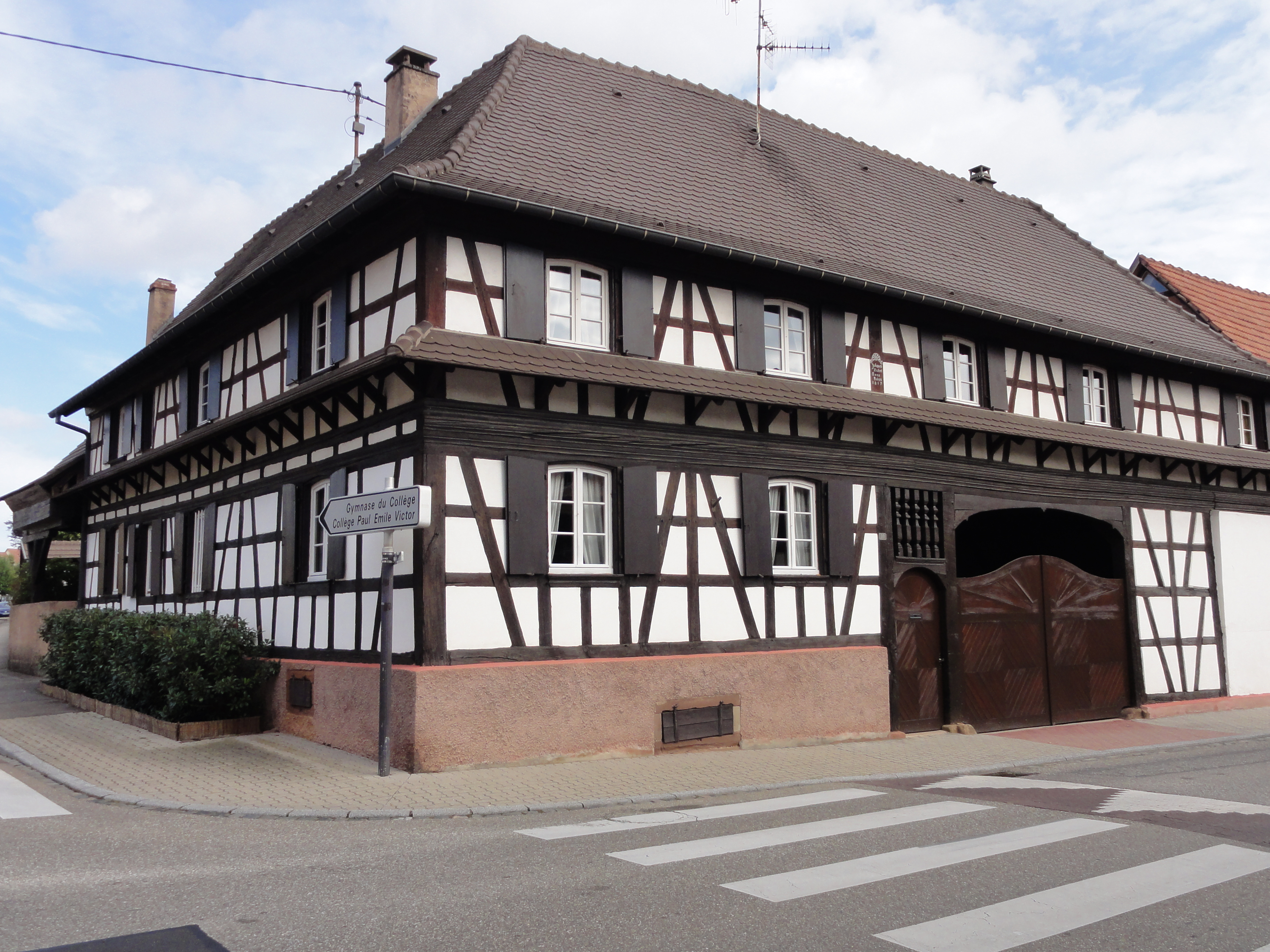 Alsace, Bas-Rhin, Mundolsheim, Ferme alsacienne (XIXe), 30 rue du Général De Gaulle. .